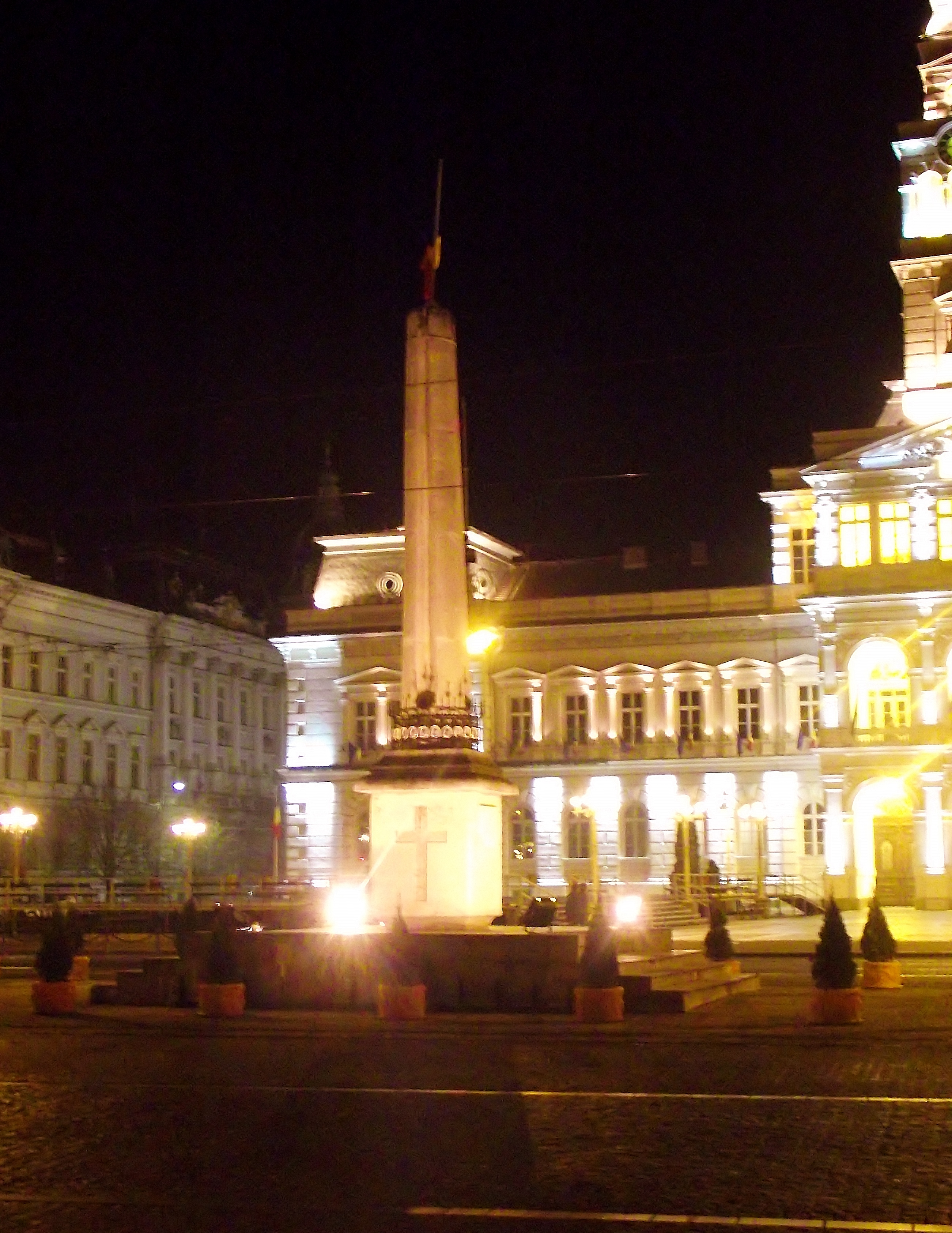 Imagine a monumentului dedicat Eroilor Revolutiei de la 1989 de la Arad.